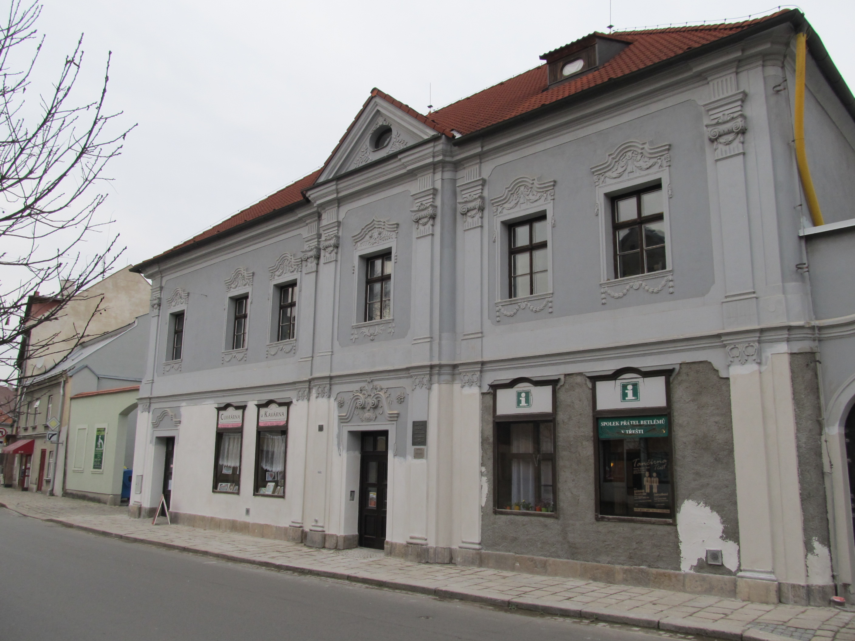 Třešť - Schumpeterův dům v Rooseveltově ulici